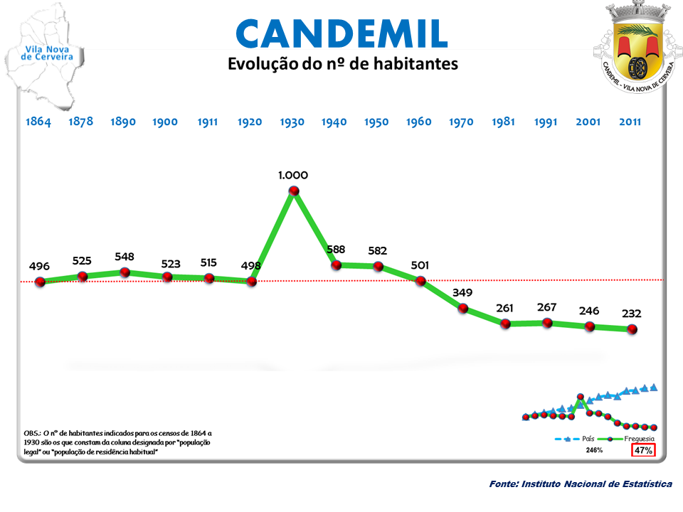 Censos 1864/2011